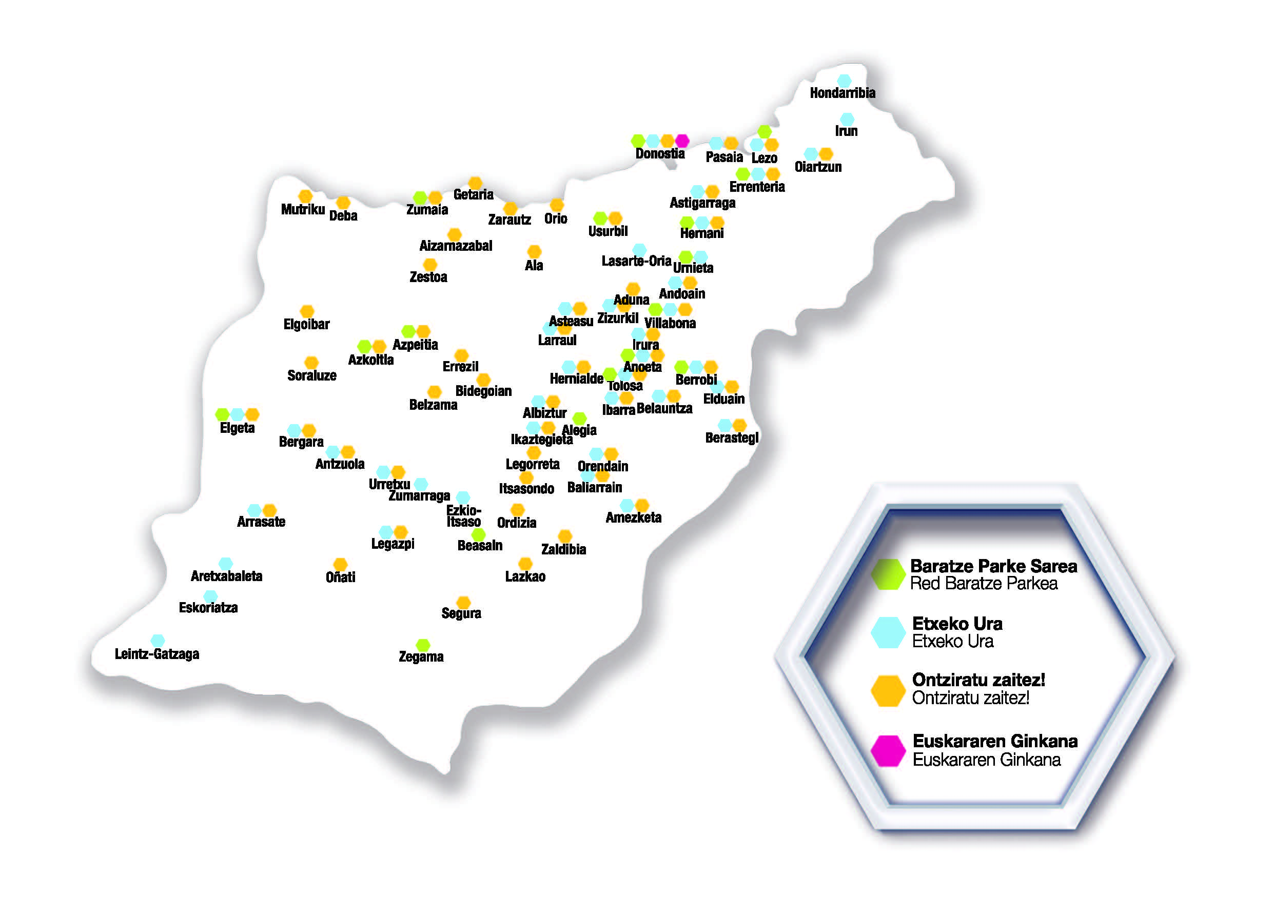 Kutxa Ekoguneko Proiektuen Mapa